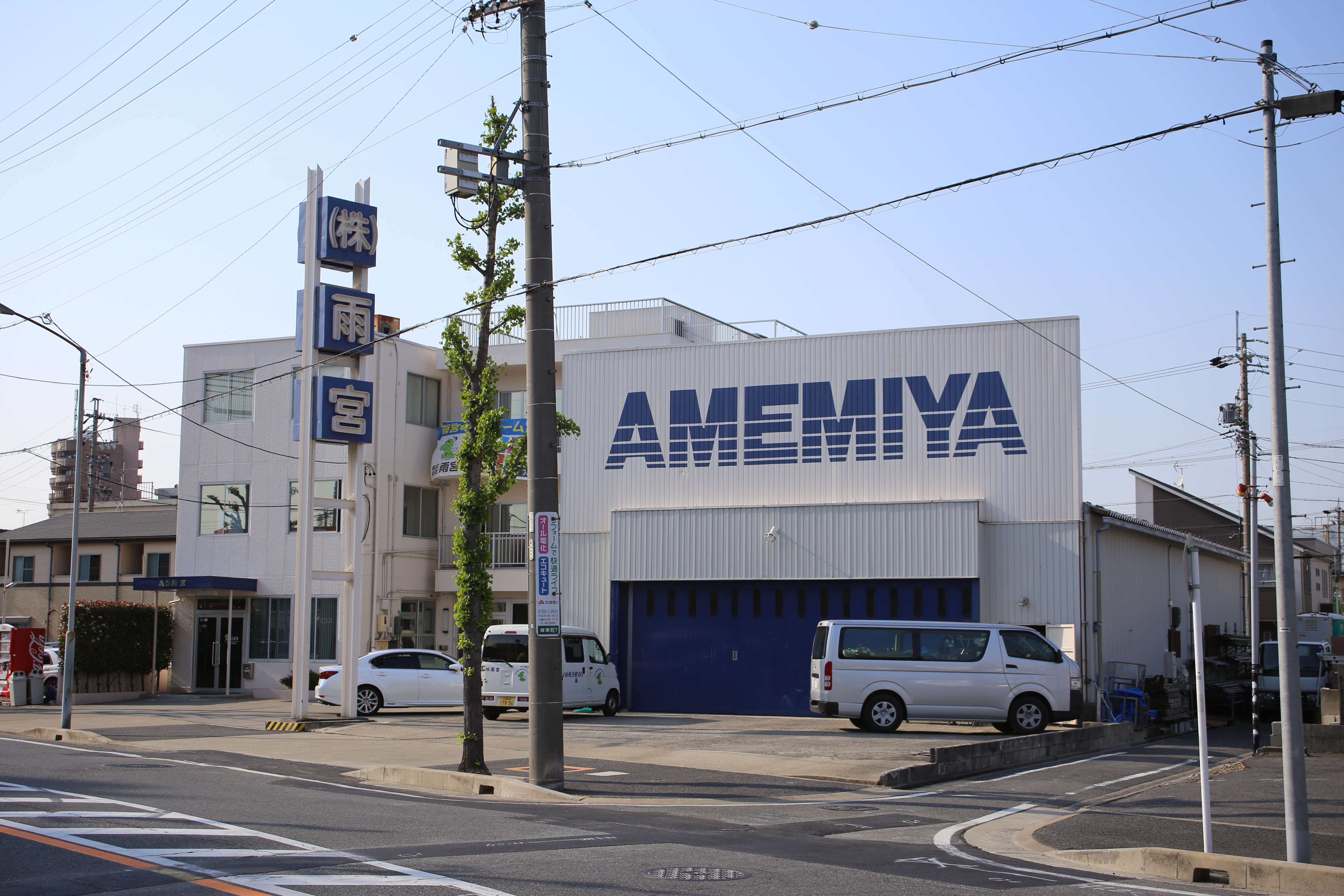 名古屋市北区城東町7丁目の雨宮本社を南側公道東側より撮影